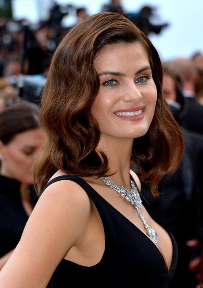 Isabeli Fontana au festival de Cannes